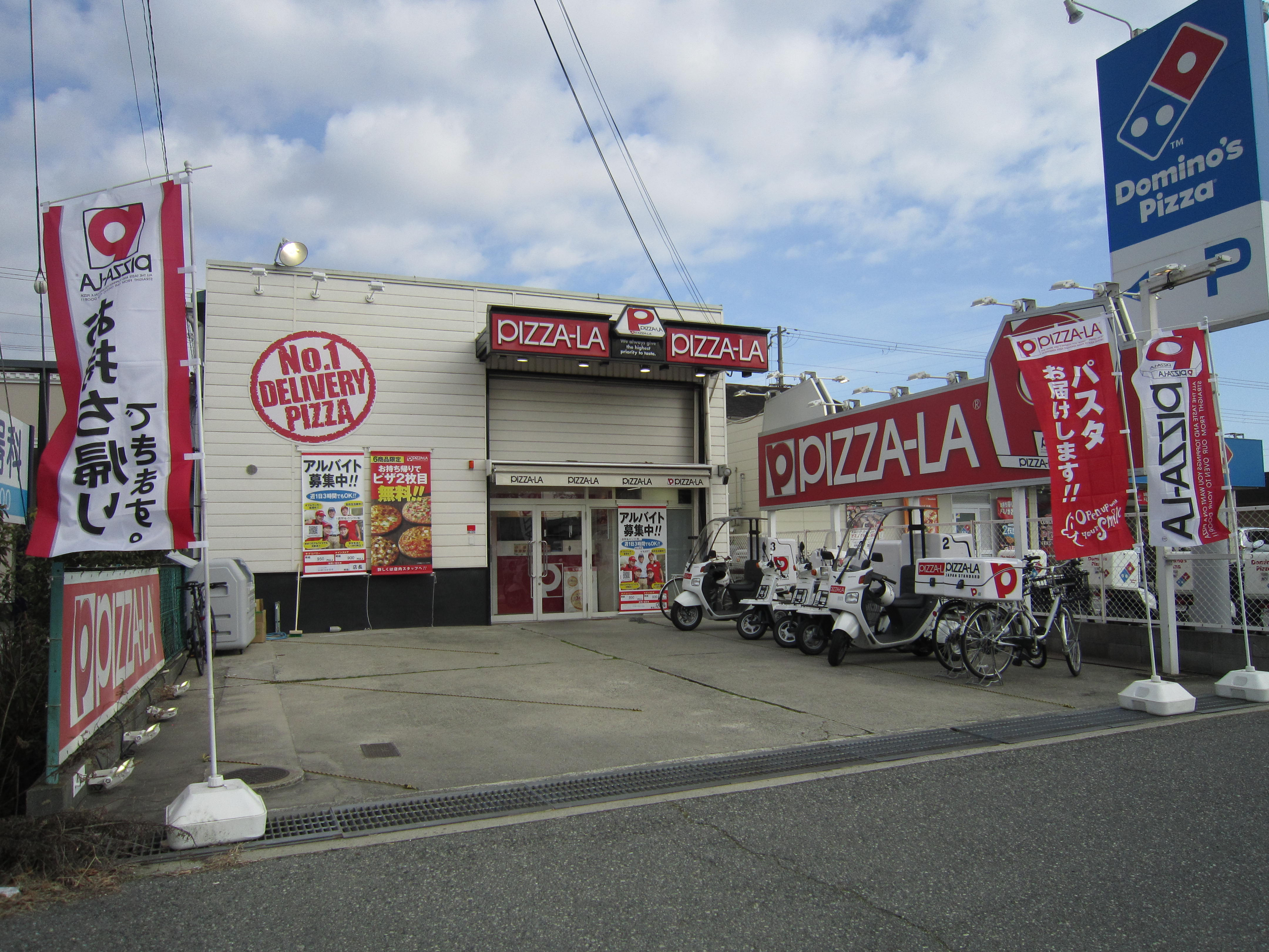 ピザーラ姫路店。ピザデリバリーショップ。